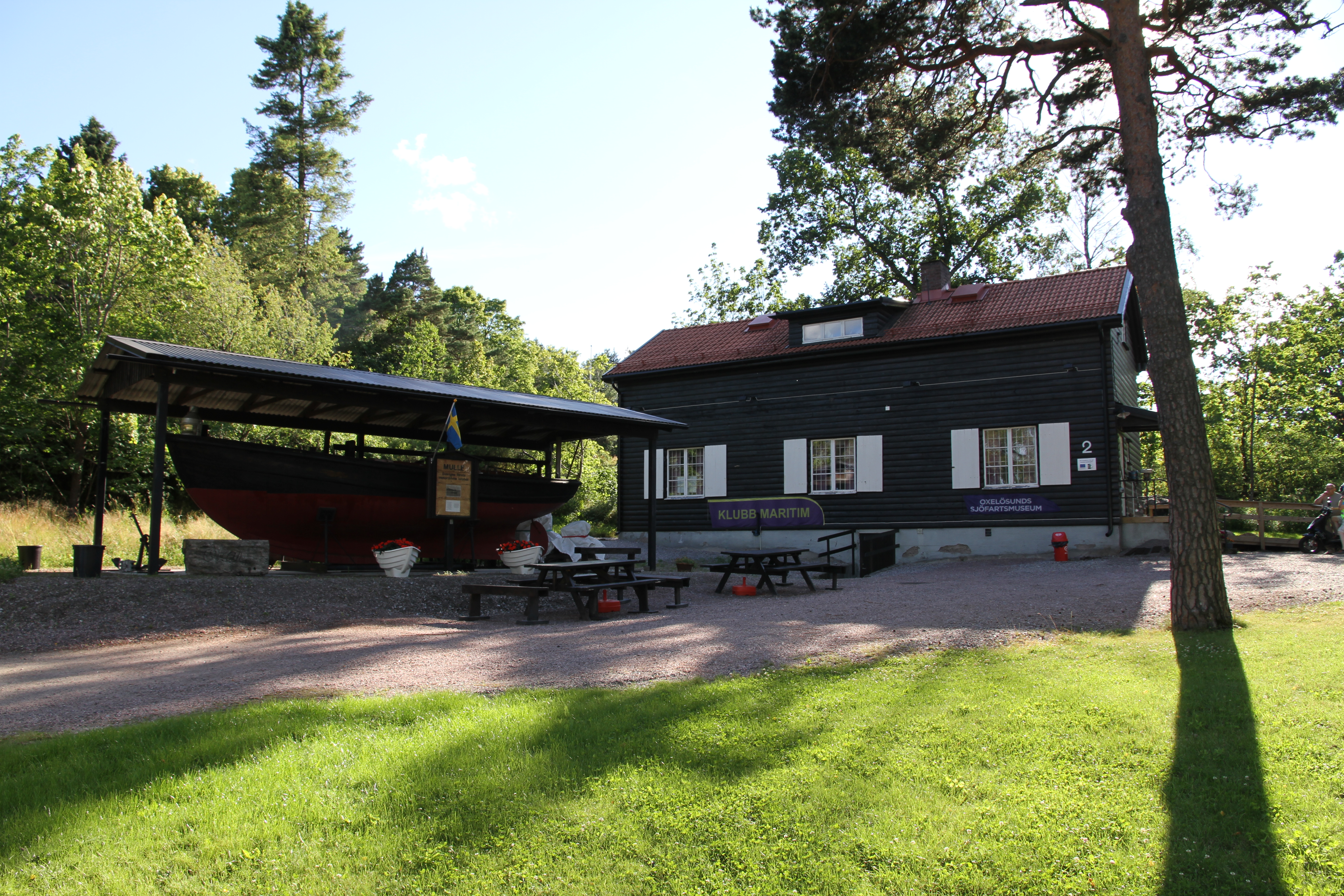 Oxelösunds Sjöfartsmuseum